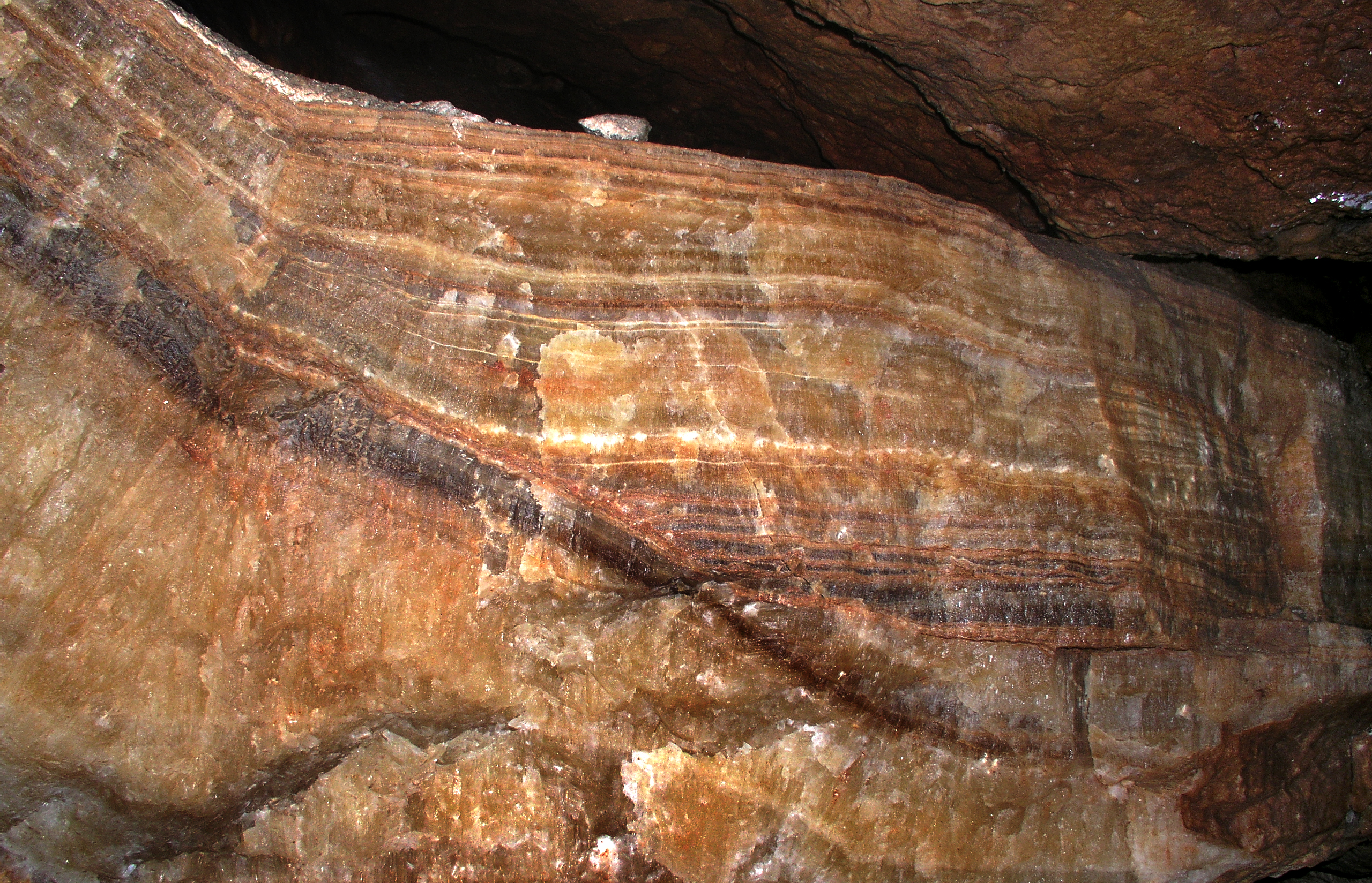 Calcita de la Cova de s'Onix (Porto Cristo, Manacor, Îslas Baleares, España).